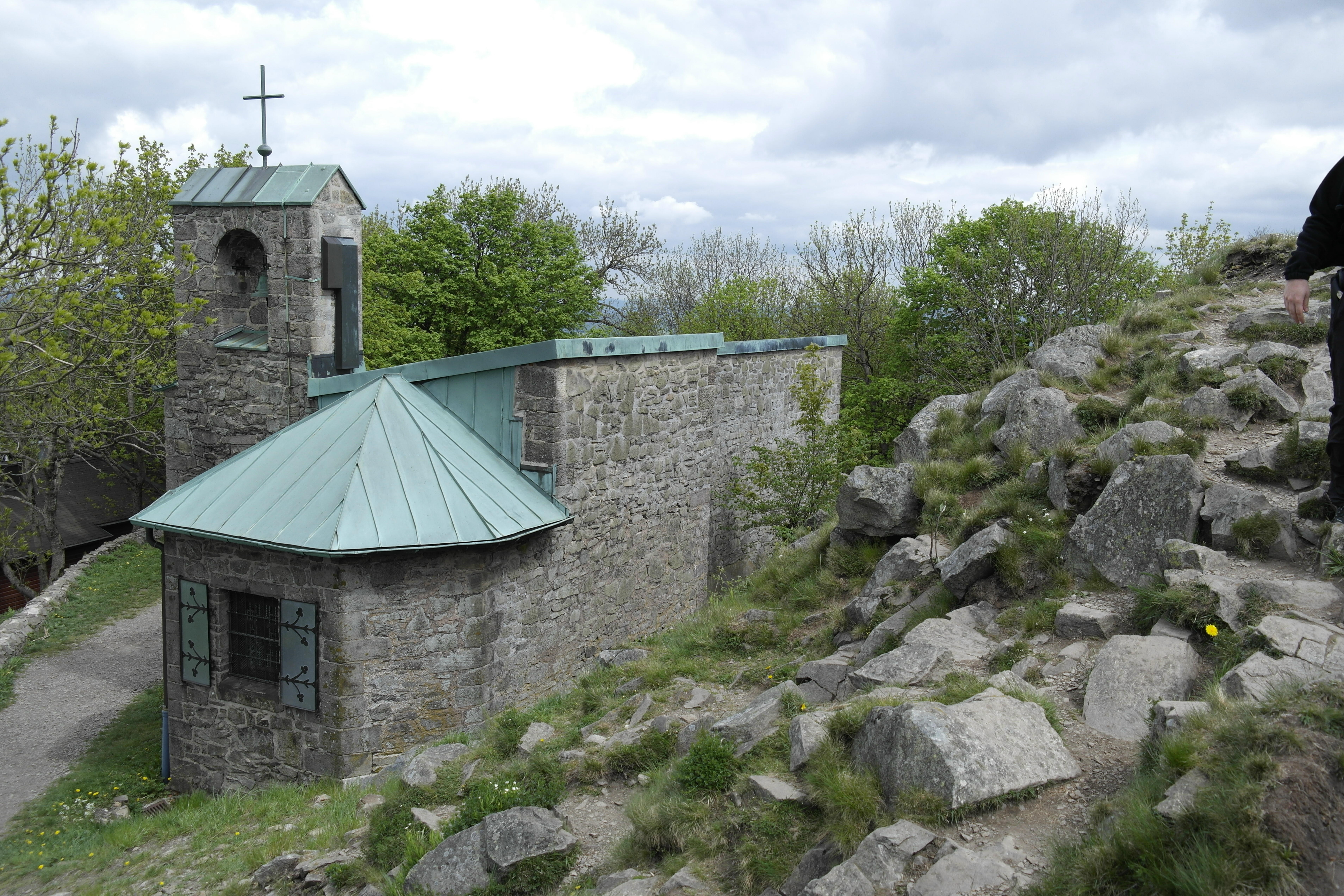 (NSG:HE-1631003)_Milseburg. Hessische Rhön-Milseburg (835m) gehört zu den grössten und wichtigsten vorgeschichtlicher Besiedlung Osthessens. Die ersten Besiedlung ist aus der Zeit 1200 bis 800 vor Christus belegt. Wallfahrtskapelle St. Gangolf.